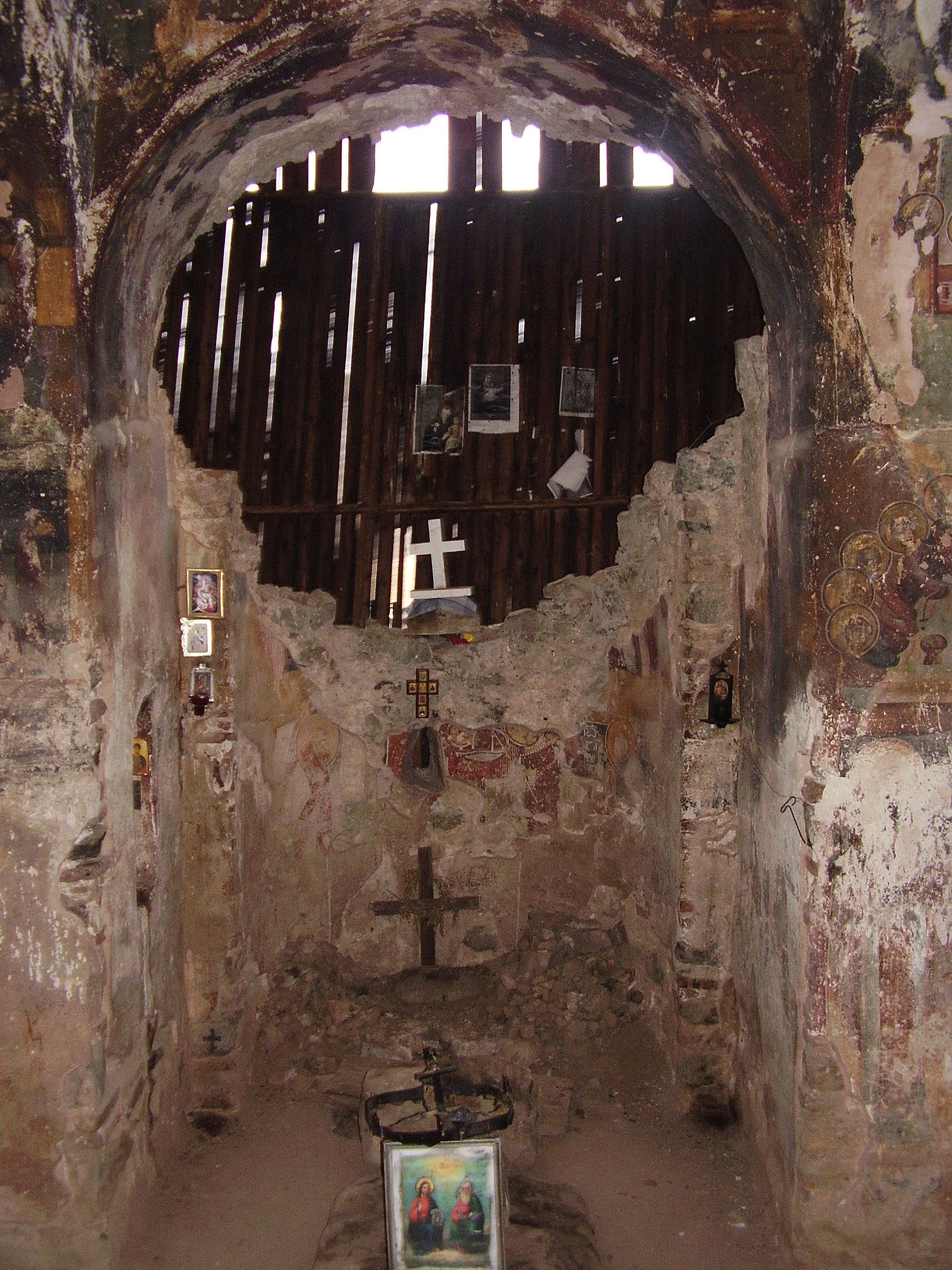 Църквата Свети Тодор - гр.Бобошево